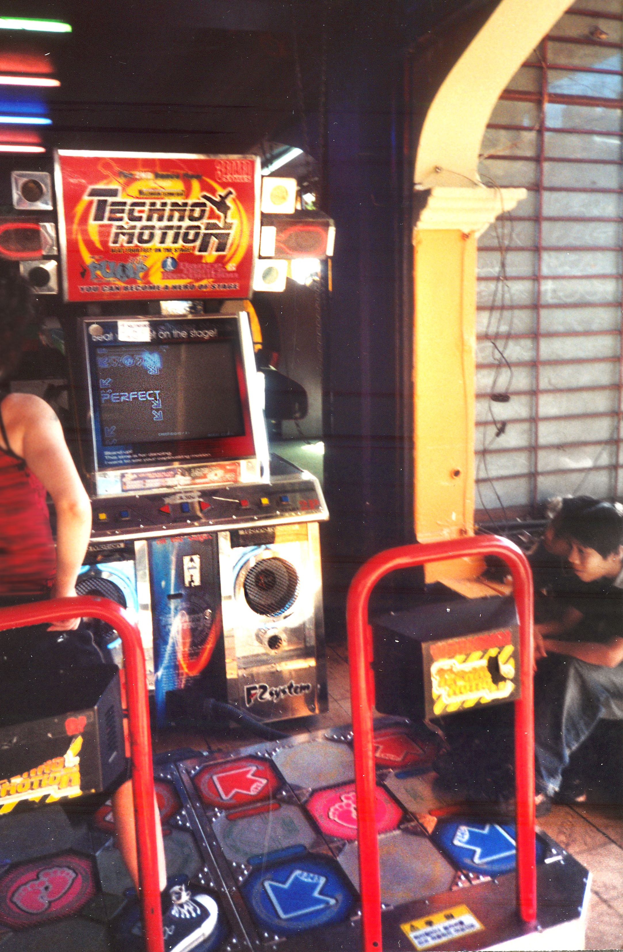 Dance video game TechnoMotion at a video arcade in Cuernavaca, México, in January 2004.